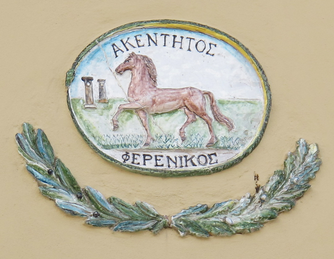 Accademia degli euteleti, ext. 05 stemma